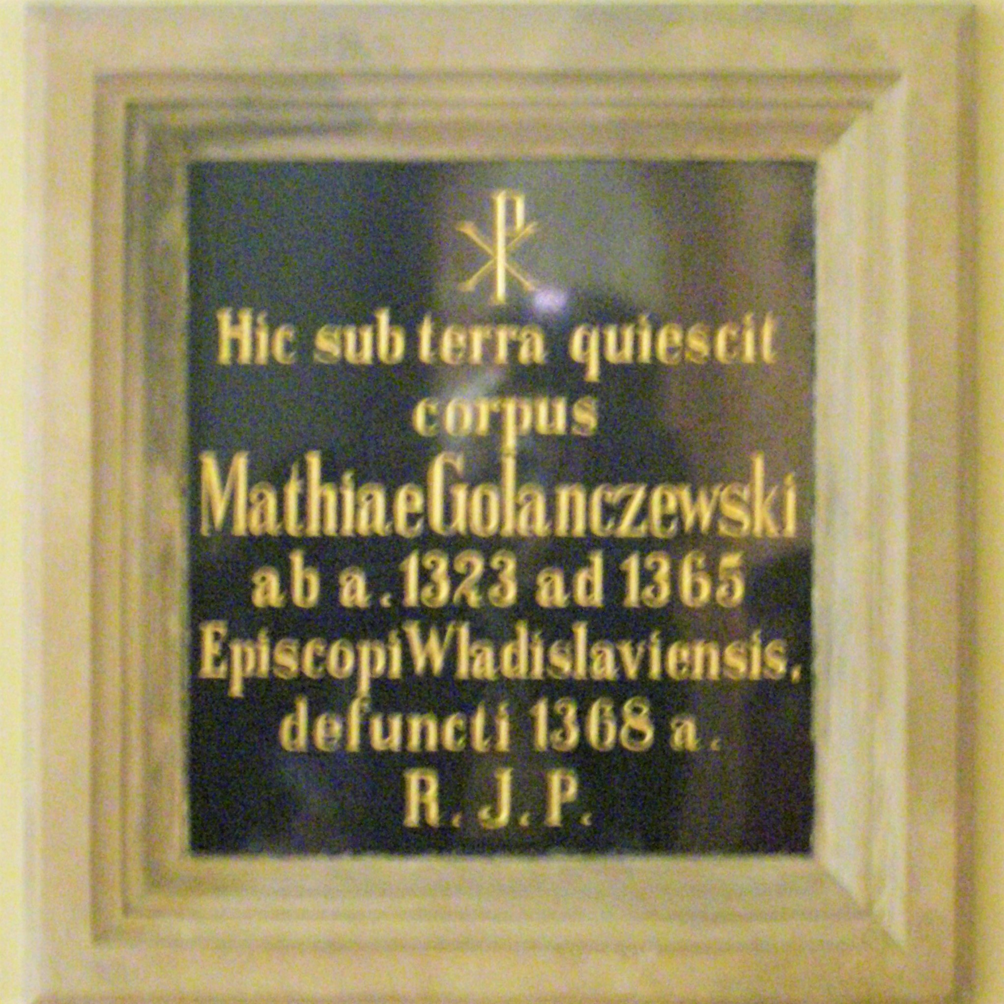 Katedra włocławska - epitafium Macieja Pałuki z Gołańczy